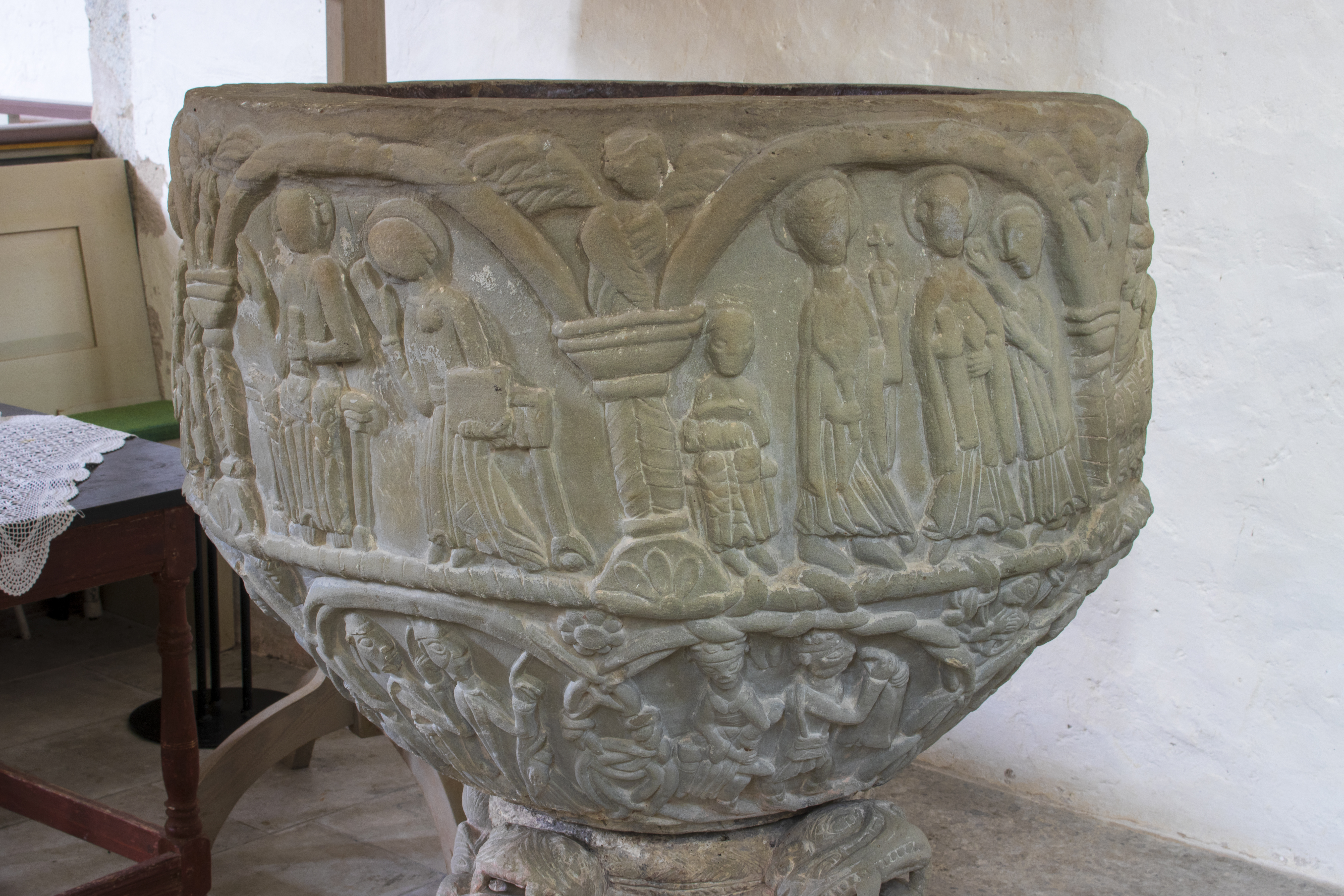 Detalle da pía bautismal da igrexa de Halla, na illa sueca de Gotland.